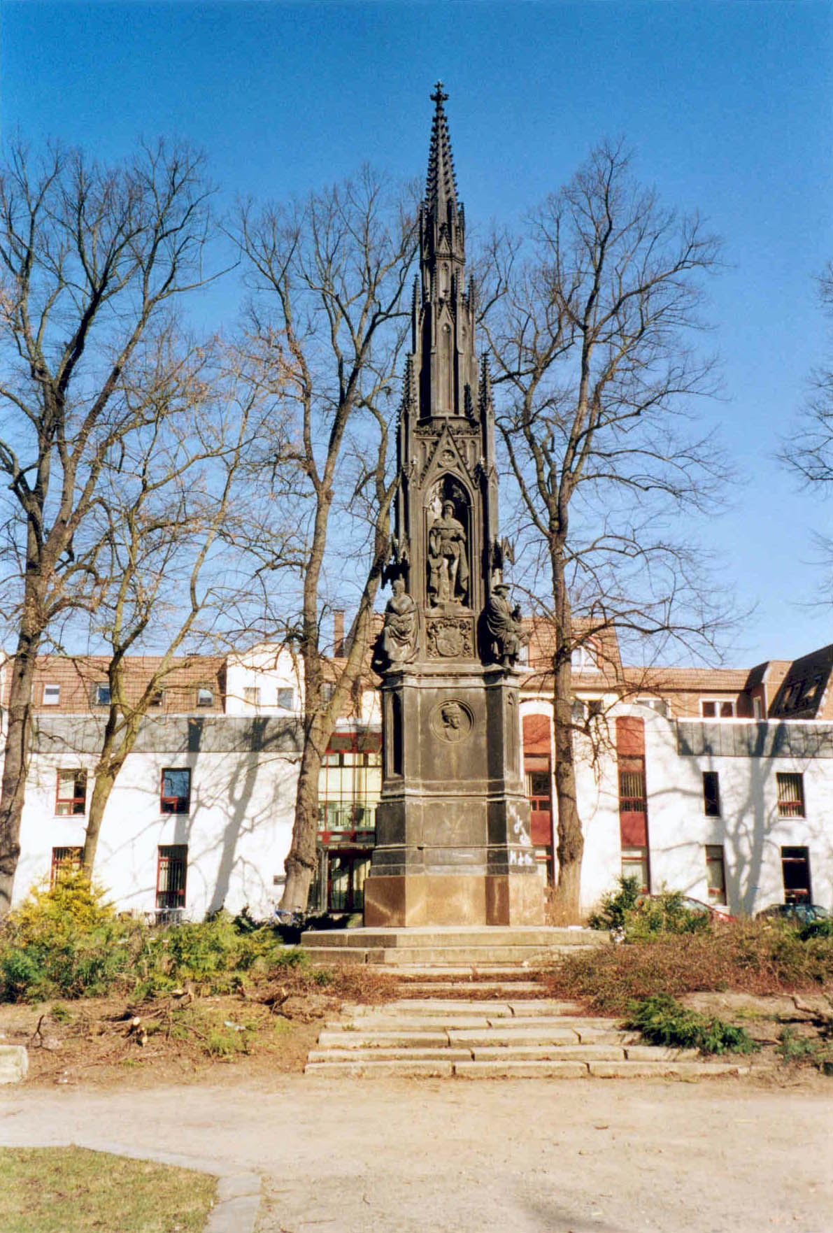 Greifswald, Rubenowplatz: Rubenowdenkmal, April oder Mai 2005 (also noch vor der Restauration). Im Hintergrund: die Theologische Fakultät der Universität Greifswald.